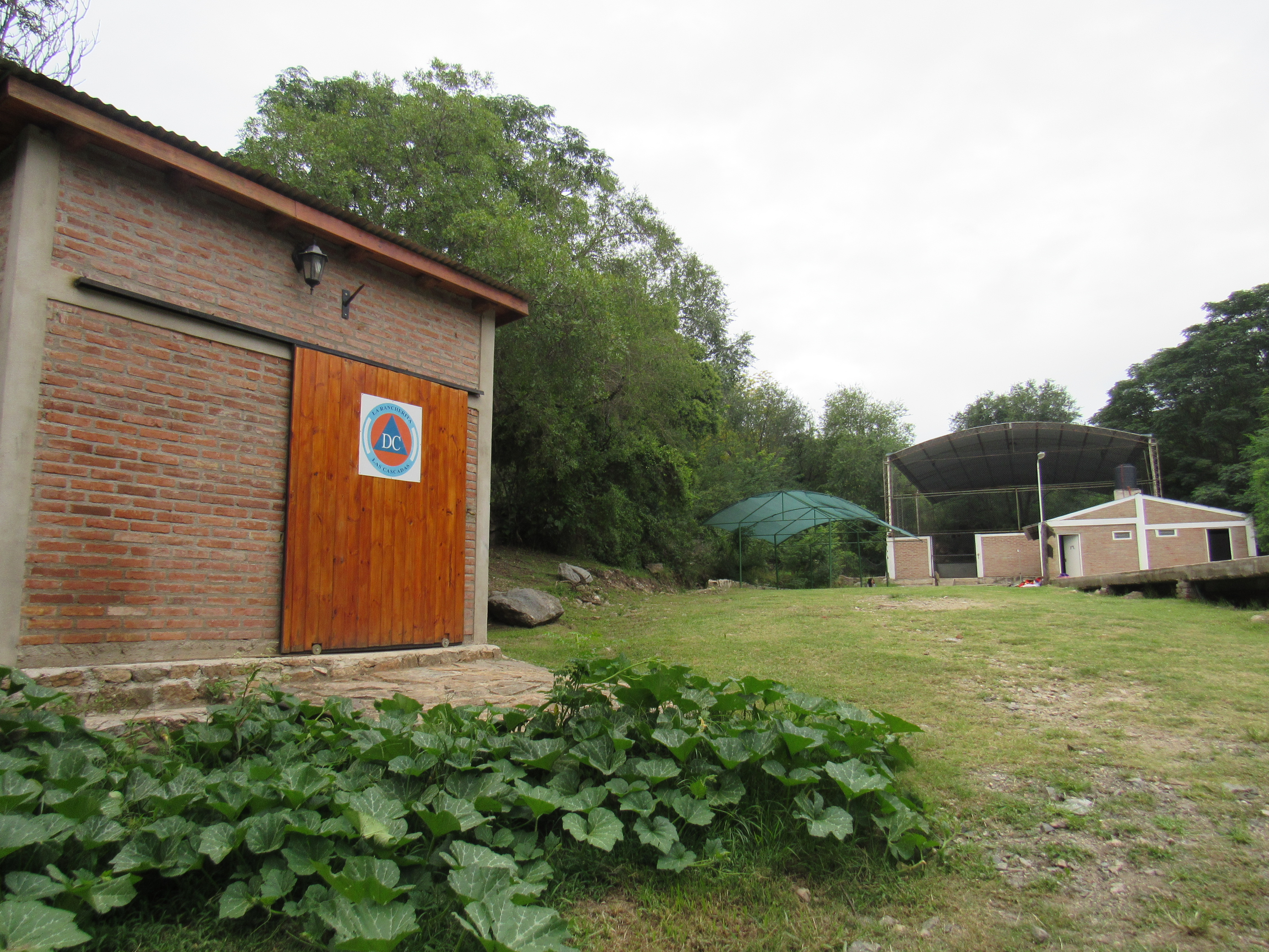 Predio de la Comuna de La Rancherita y Las Cascadas, Córdoba, Argentina